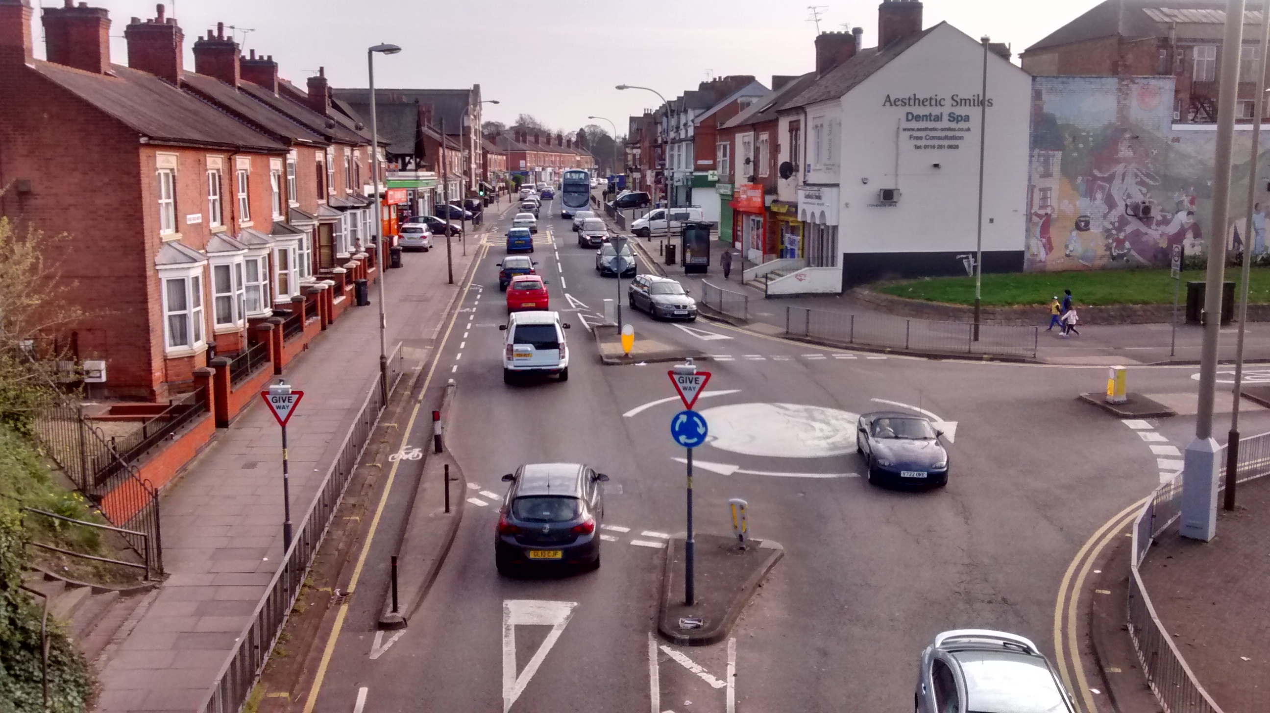 Rondo na ul. Fosse North Road